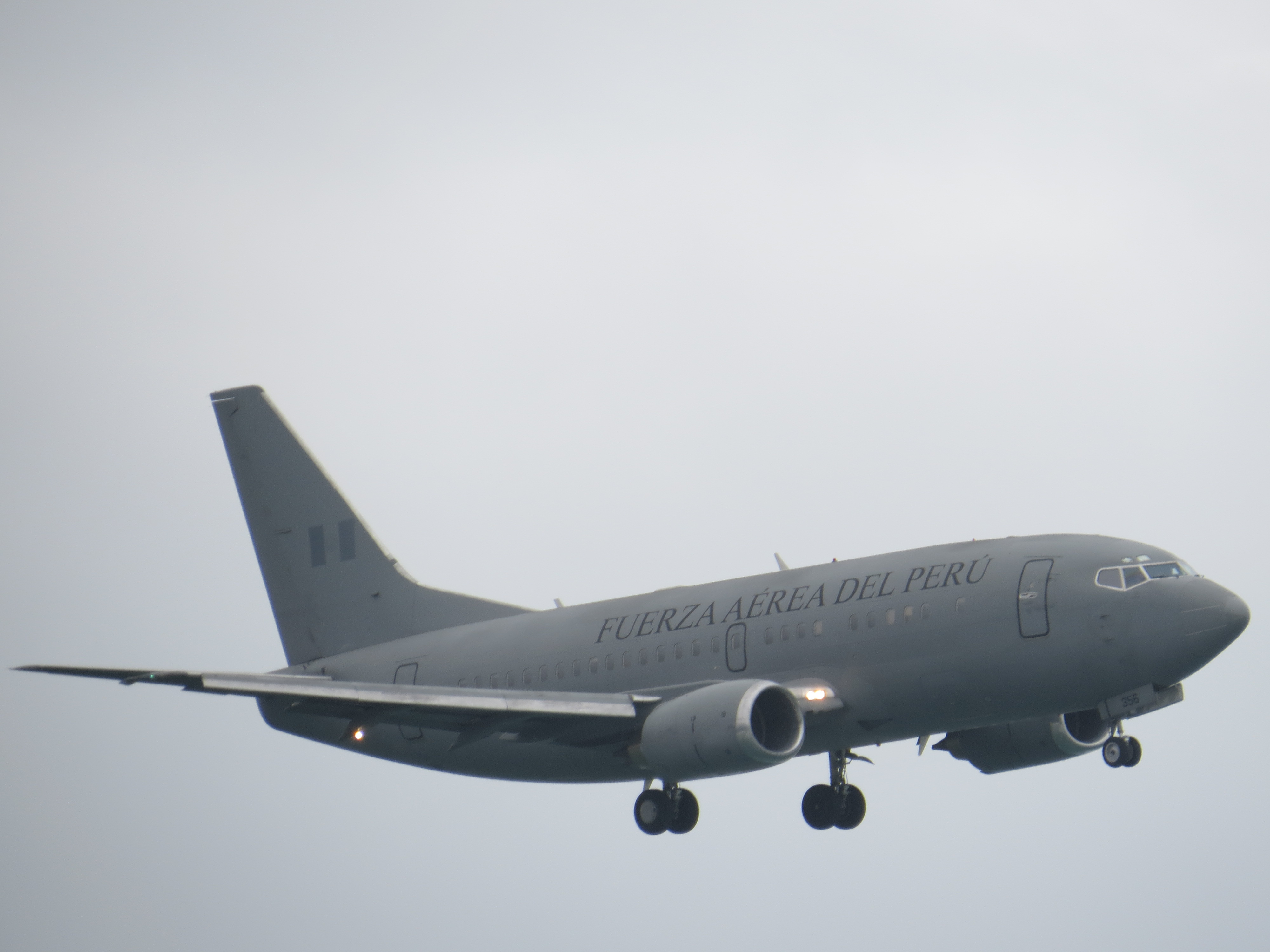 Avión Presidencial de Perú durante exhibición de la Fuerza Aérea del Perú en la costa de Lima (02-08-2015)